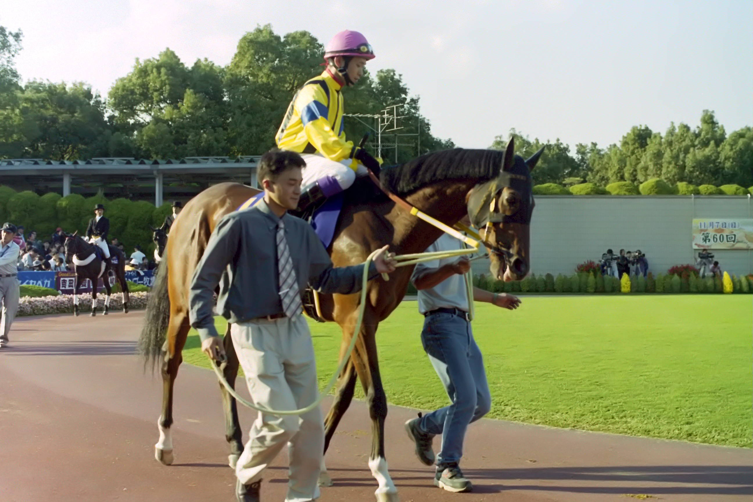 第60回菊花賞のパドックで、15番ロサード号と江田照男騎手を撮影したもの。